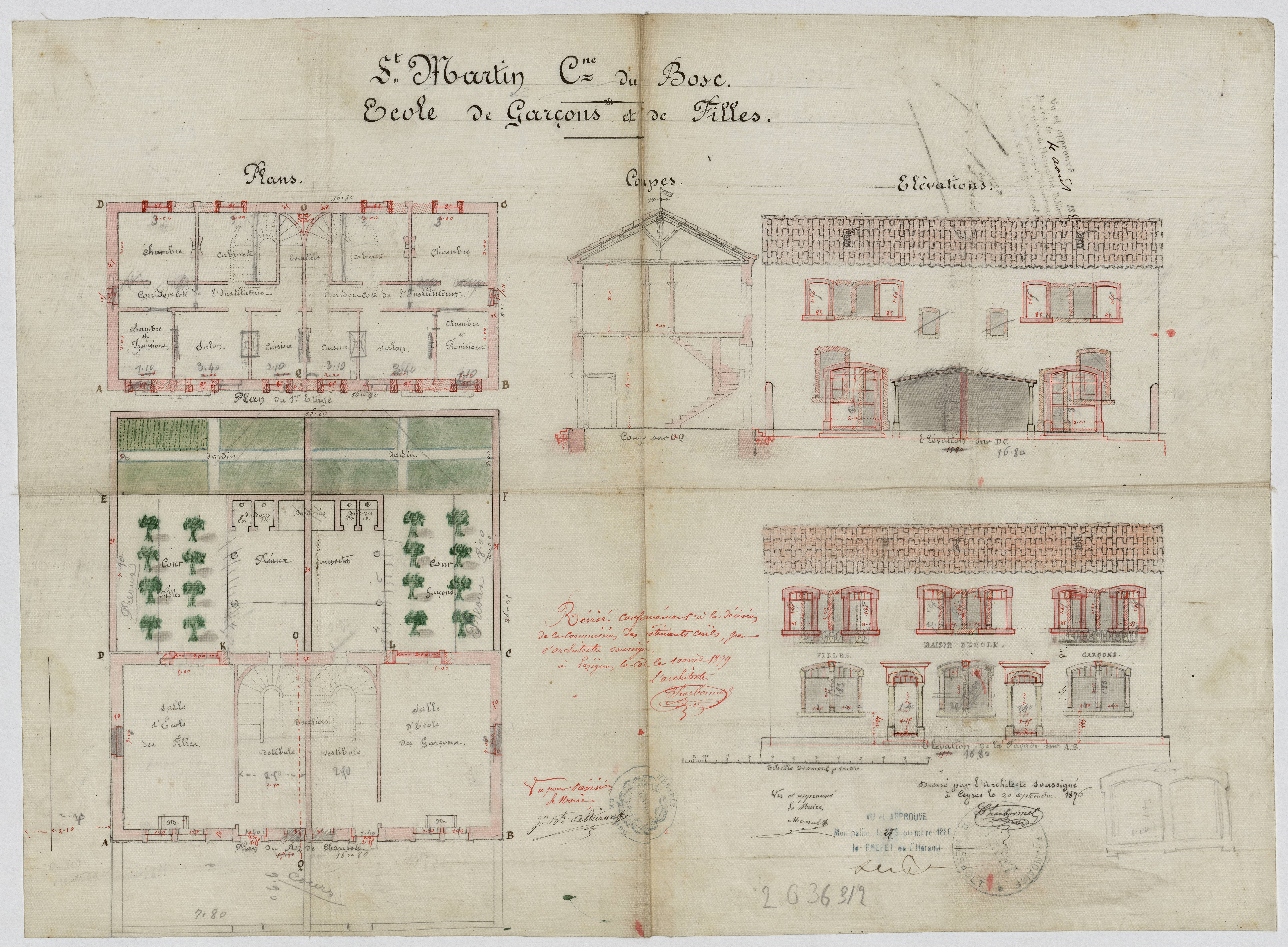 Le Bosc, hameau de Saint-Martin. - École de garçons et de filles : plans, coupes, élévations